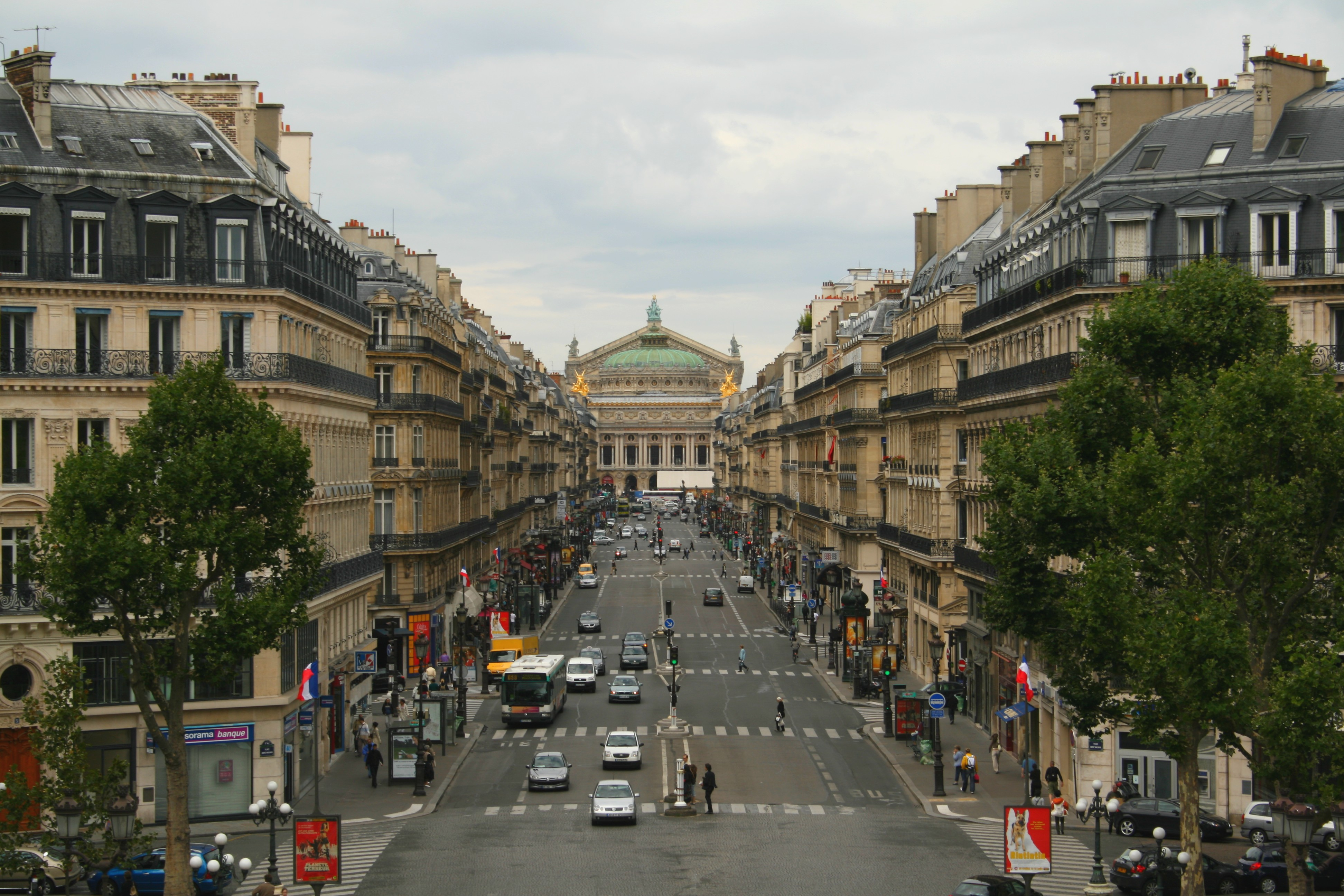 Avenue de l'Opéra, view from a room of the Hôtel du Louvre.